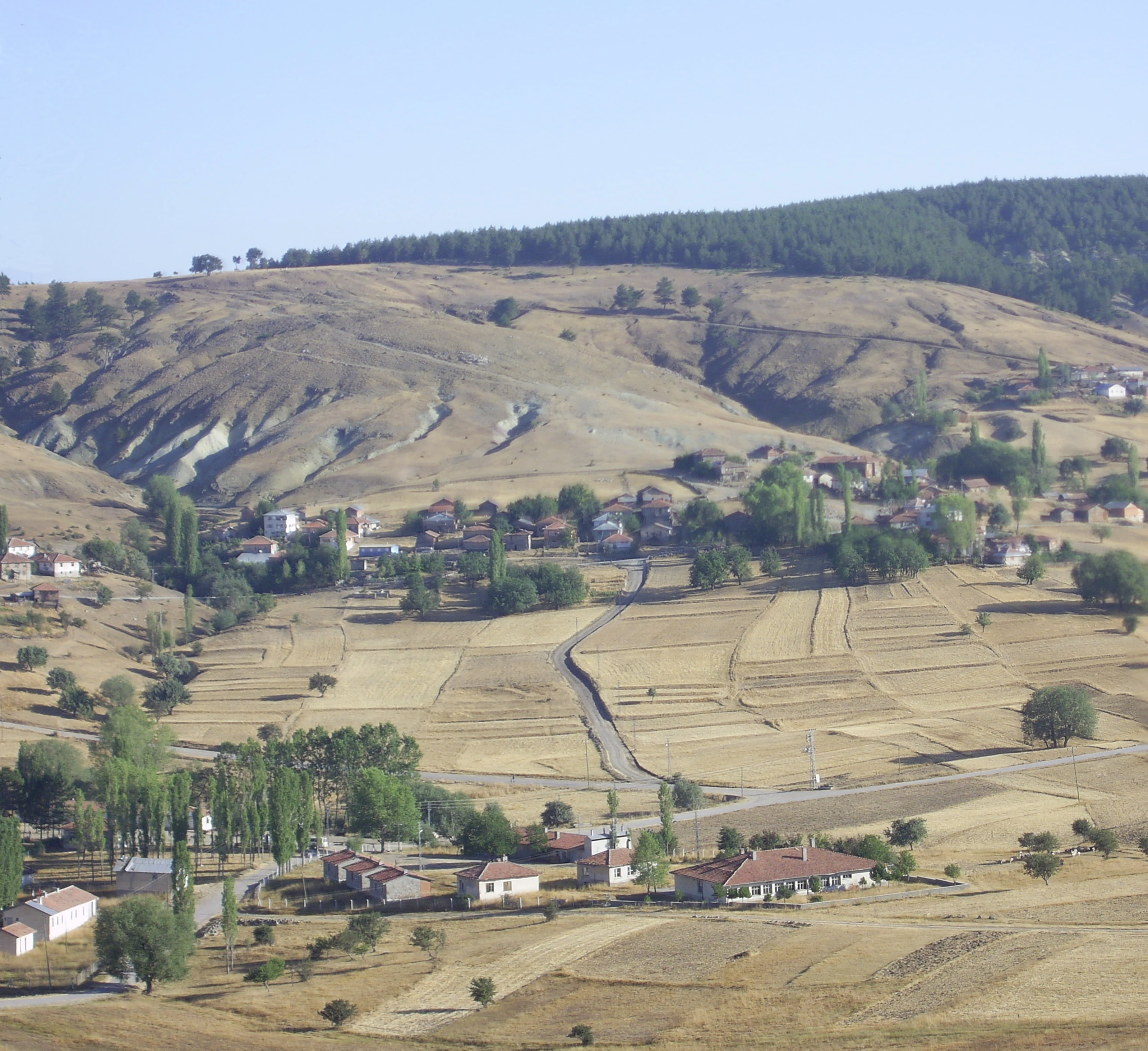 Kilkuyu, Tosya , Kastamonu